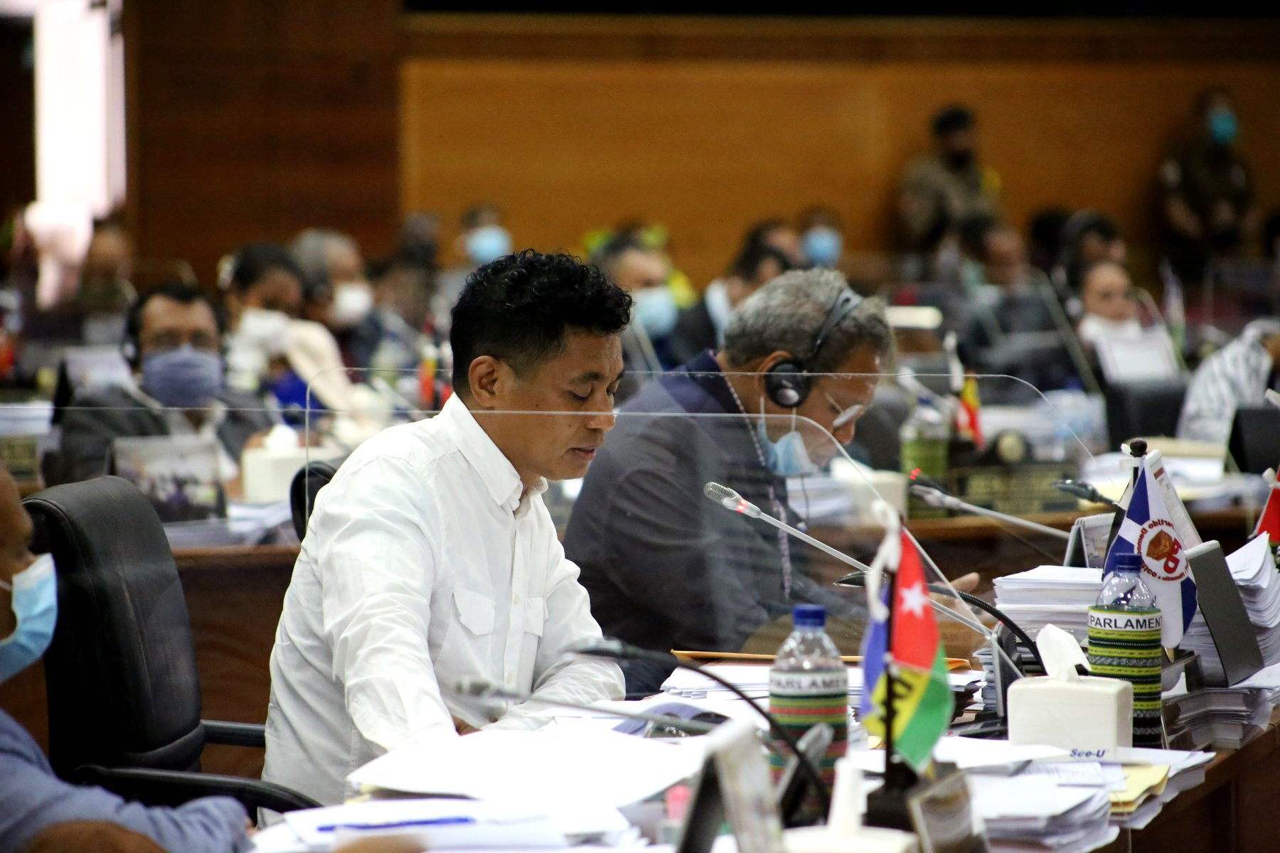 Mariano Sabino Lopes in der Sitzung zur Verlängerung des Ausnahmezustandes im Nationalparlament Osttimors